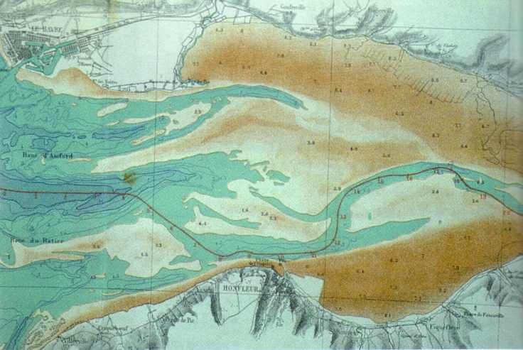 estuaire de la seine, 1875